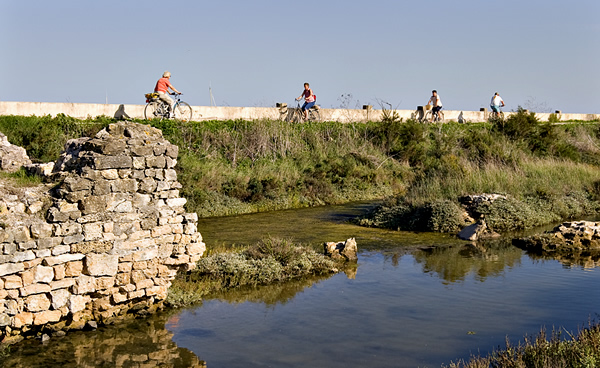 Vélos le long des marais de Loix - île de Ré - Photo issue de ma banque d'images